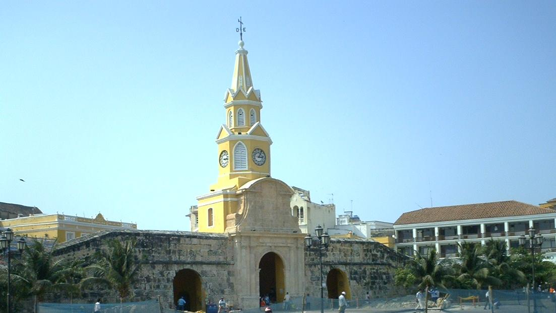 La torre de la puerta del reloj en Cartagena, Colombia